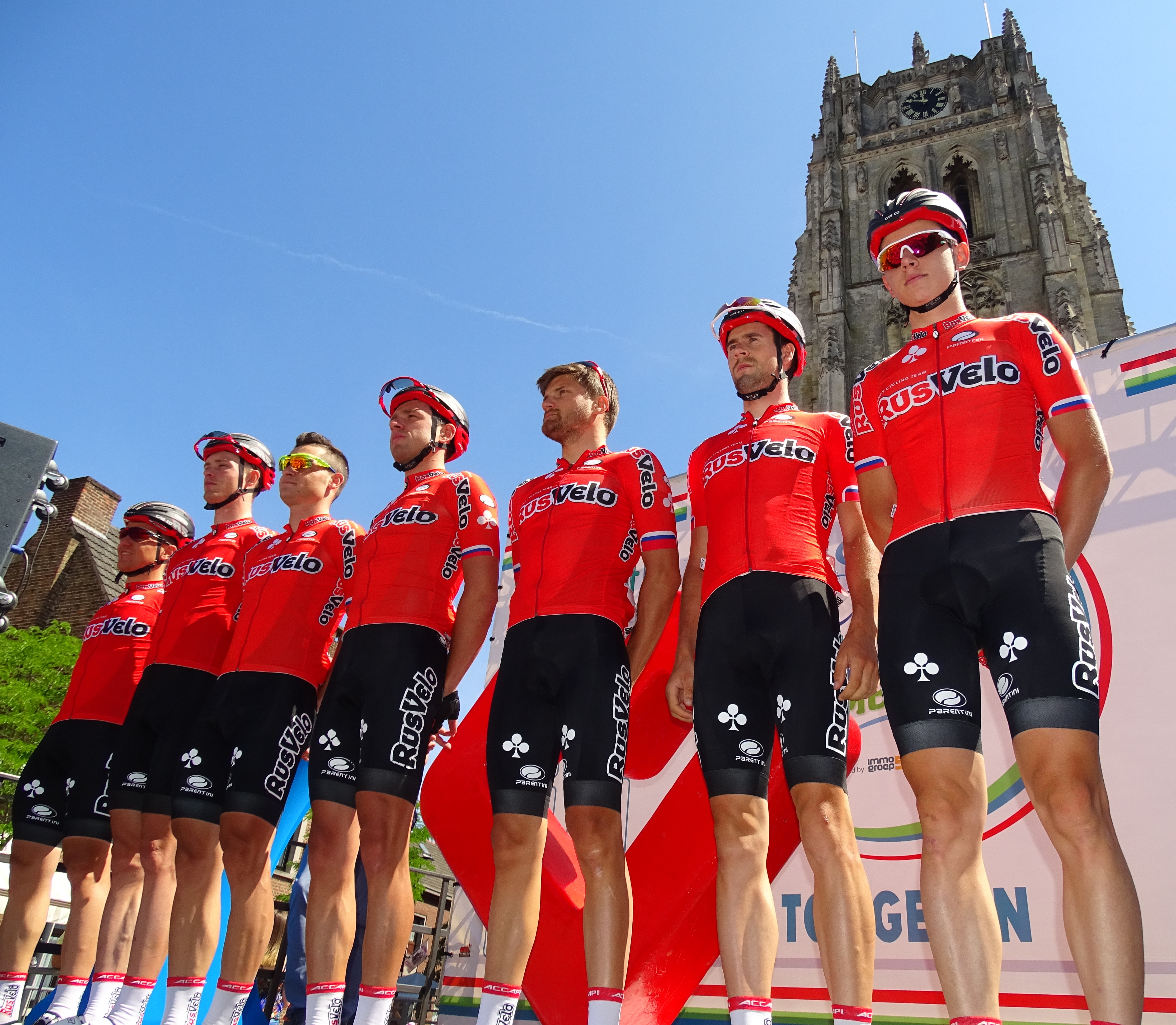 Reportage réalisé le dimanche 14 juin à l'occasion du départ et de l'arrivée du Tour du Limbourg 2015 à Tongres, Belgique.